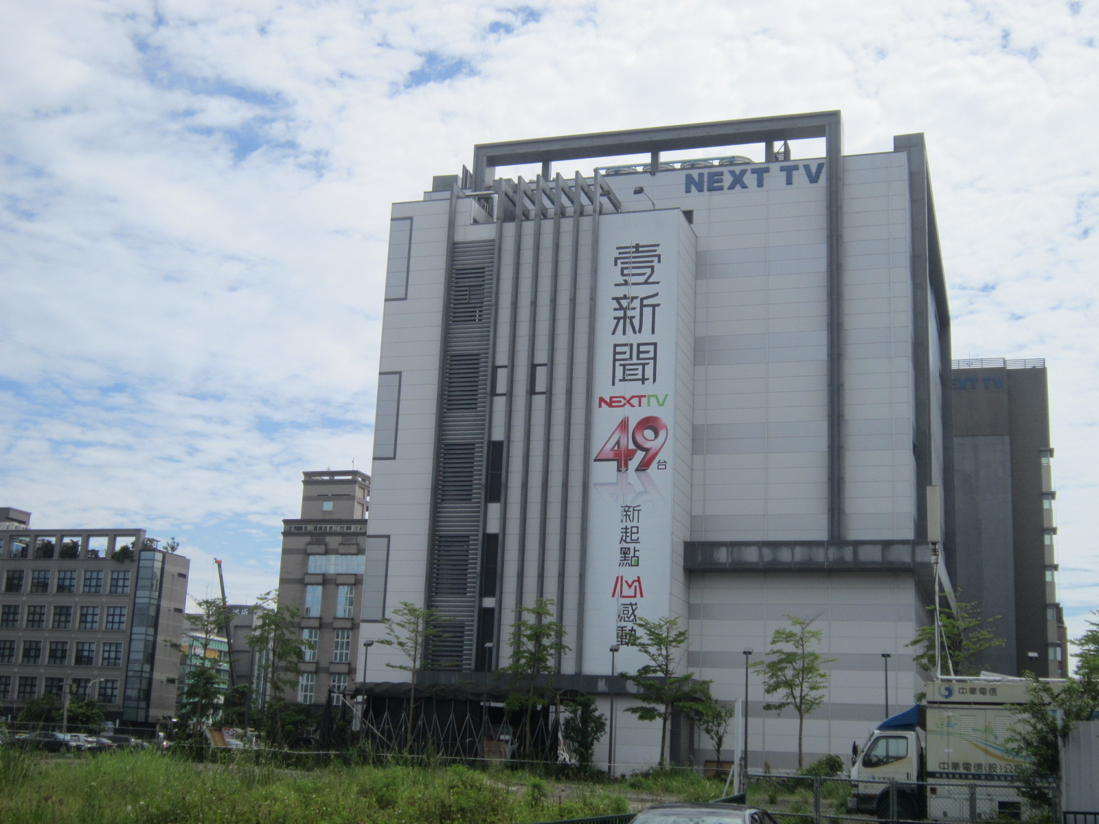 中文（台灣）: 壹電視總部大樓